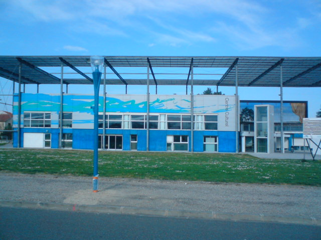 Centre culturel de la ville du Passage d'Agen